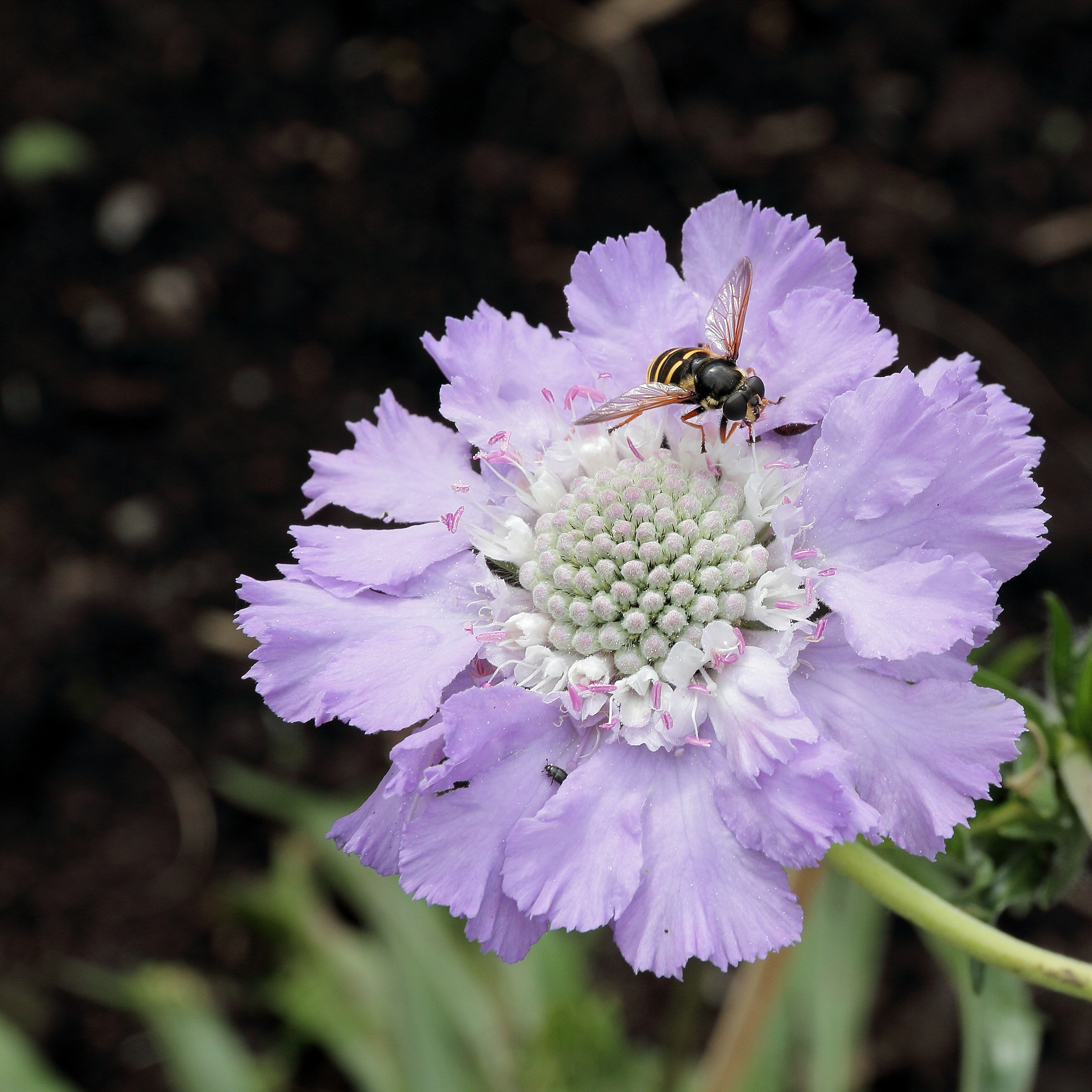 Scabiosa caucasica i Västerås botaniska trädgård.